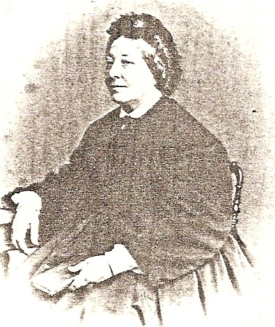 Portrait présumé de Marie-Ernestine Serret, document inédit.